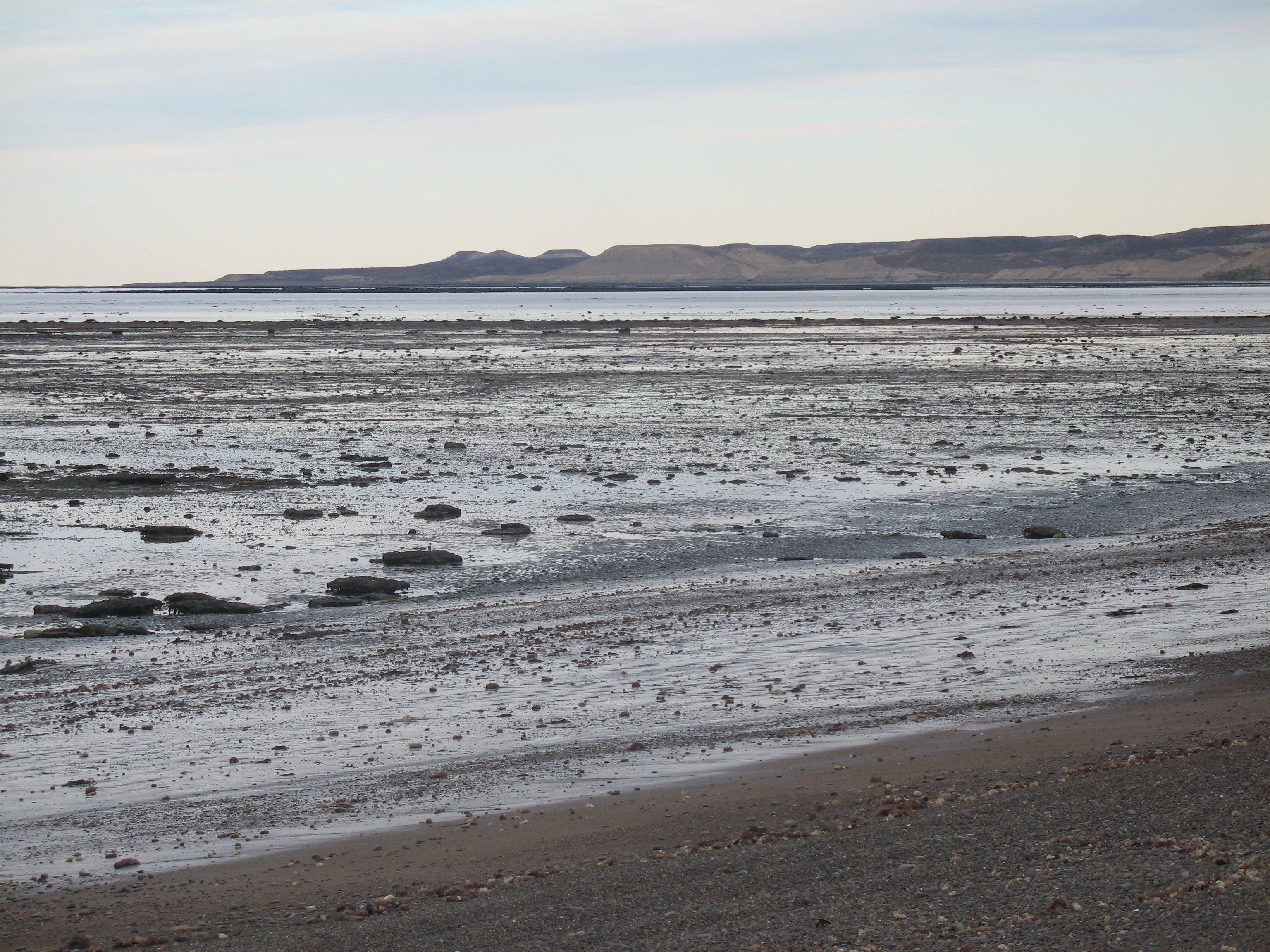 Vista desde el norte de la Punta Bauza